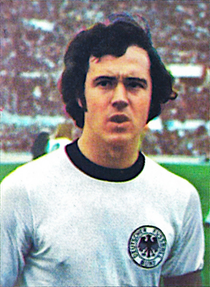 Franz Beckenbauer (1975), 'Calciatori 1975 - 1976', Panini figurina n°619.